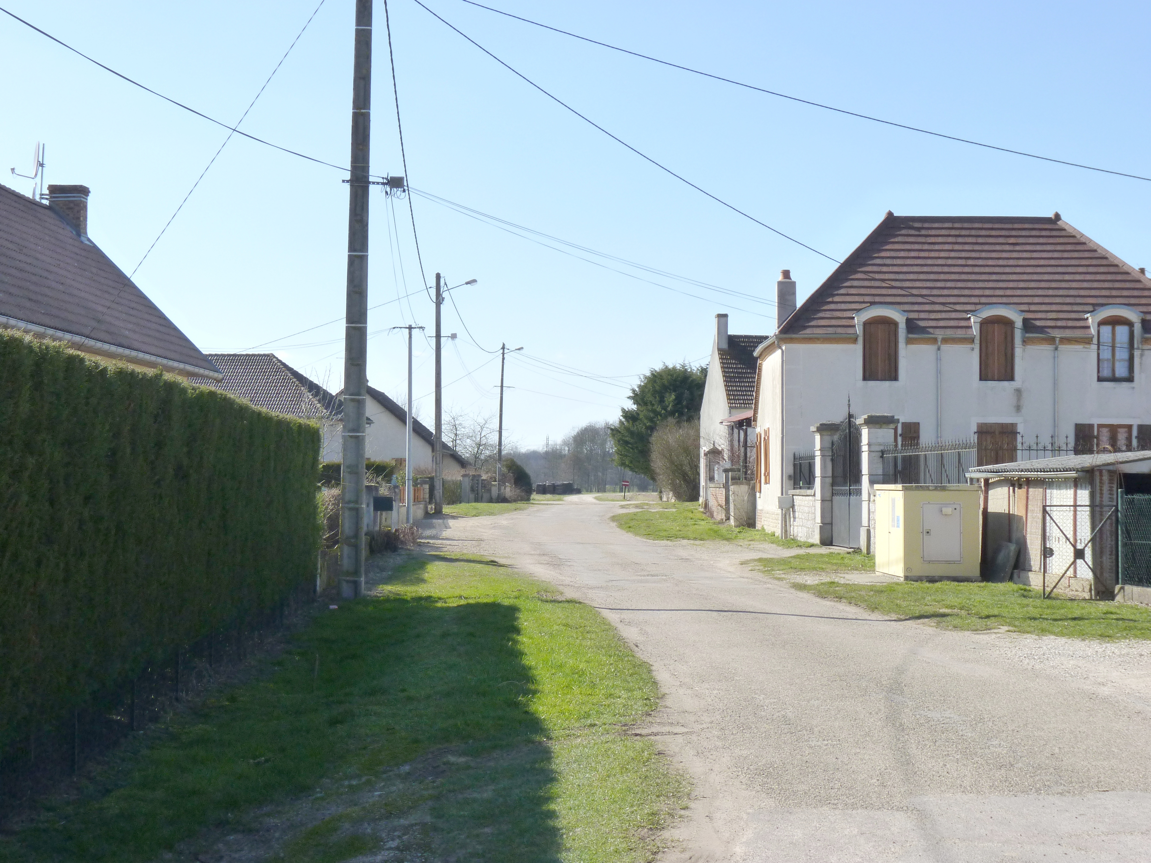 Rue de la Tuilerie, Aubigny-en-Plaine (Côte d'Or, Bourgogne, France)